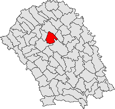 Categorie:Hărţi ale judeţului Botoşani